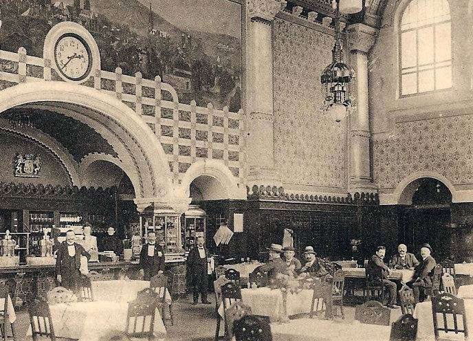 Photographie ancienne du buffet de la gare de Metz, au début du XXe siècle.